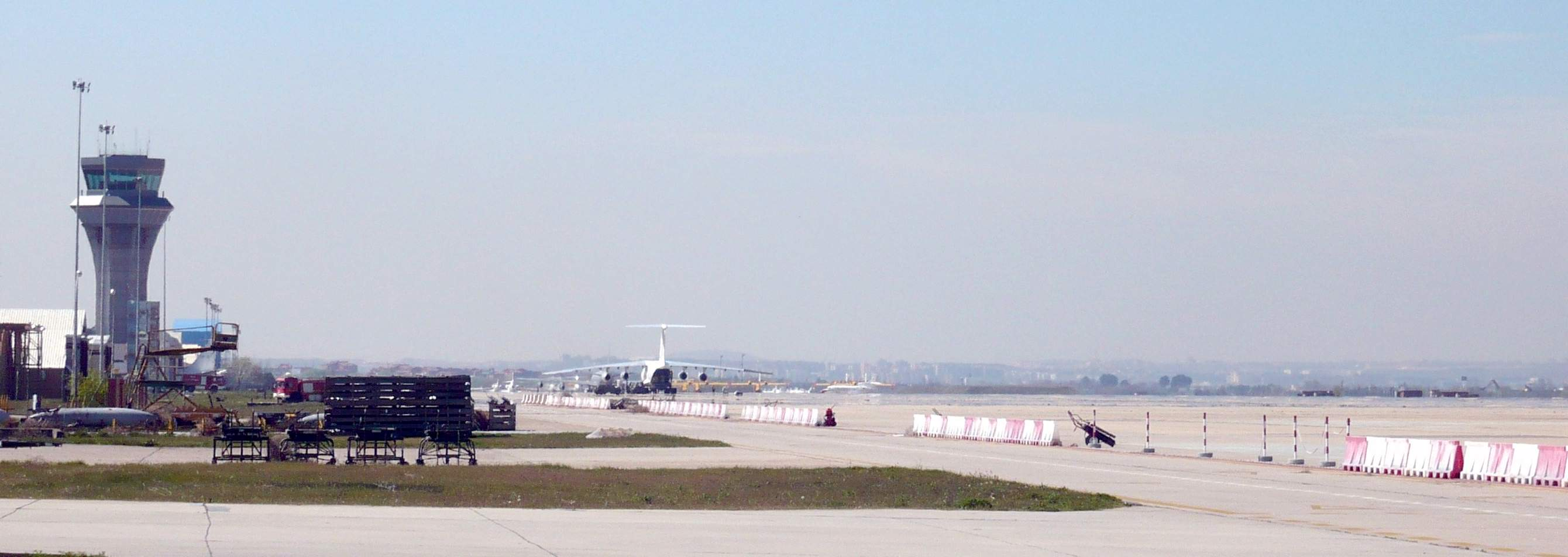 Aeródromo de Torrejón de Ardoz, Comunidad de Madrid, España.